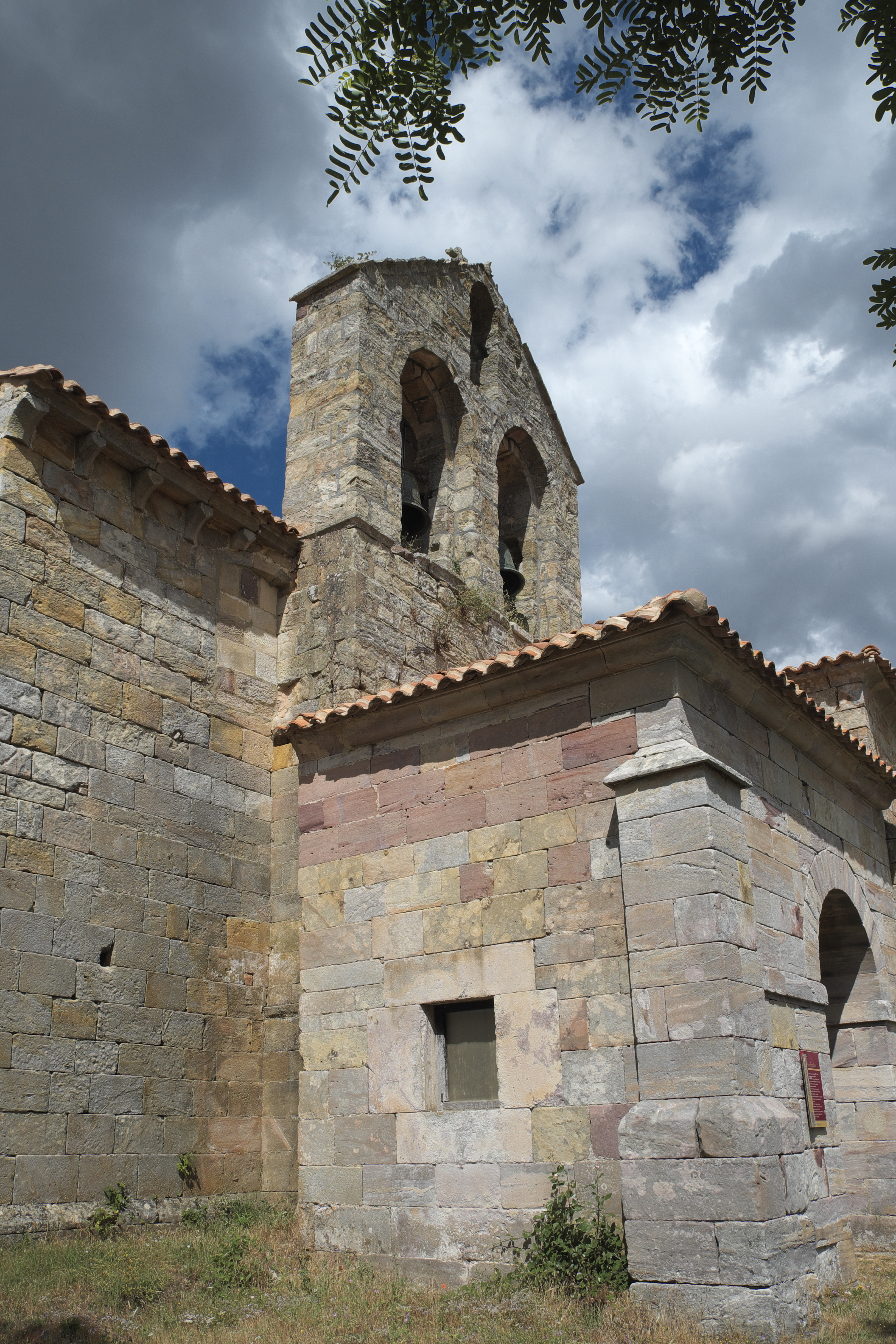 Katholische Kirche San Esteban in Lomilla, einem Ortsteil von Aguilar de Campoo in der Provinz Palencia (Kastilien-León/Spanien)